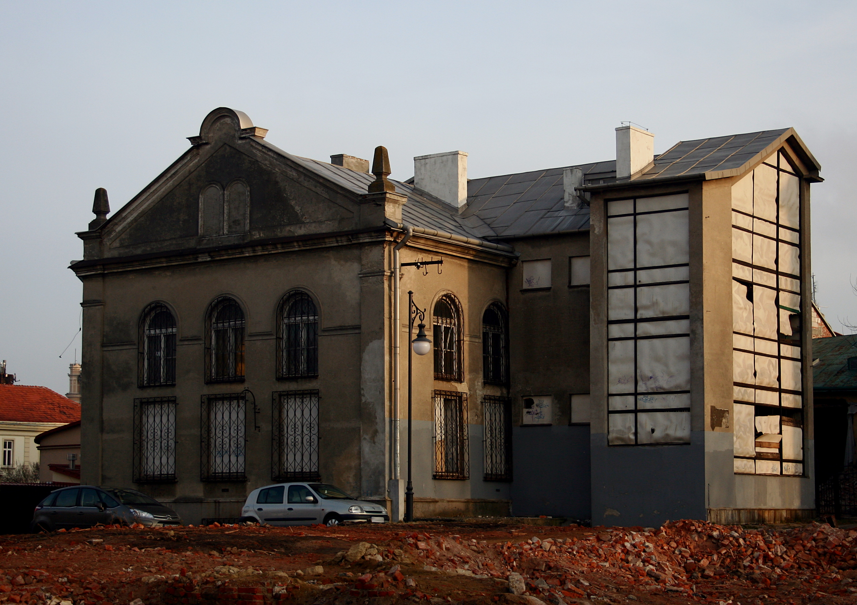 Mała Synagoga w Jarosławiu